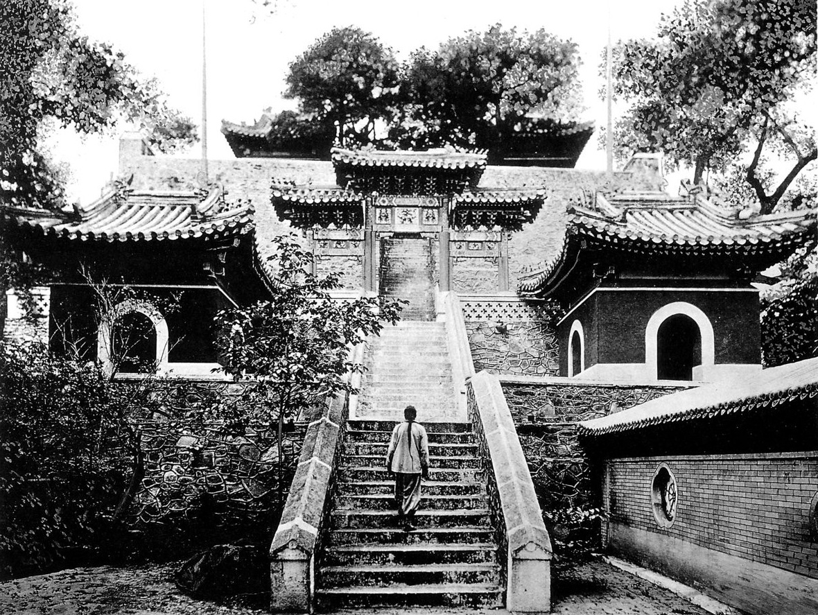 photo from Ein Tagebuch in Bildern